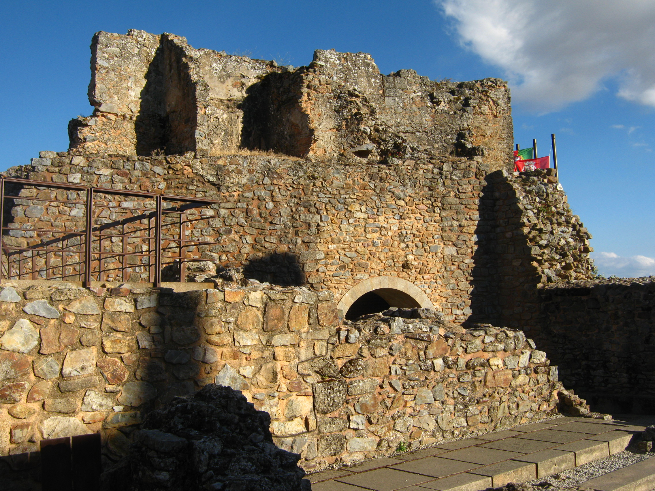 Interior del castillo de Castelo Rodrigo